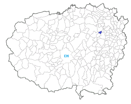 Posizione del comune nella provincia di Cuneo